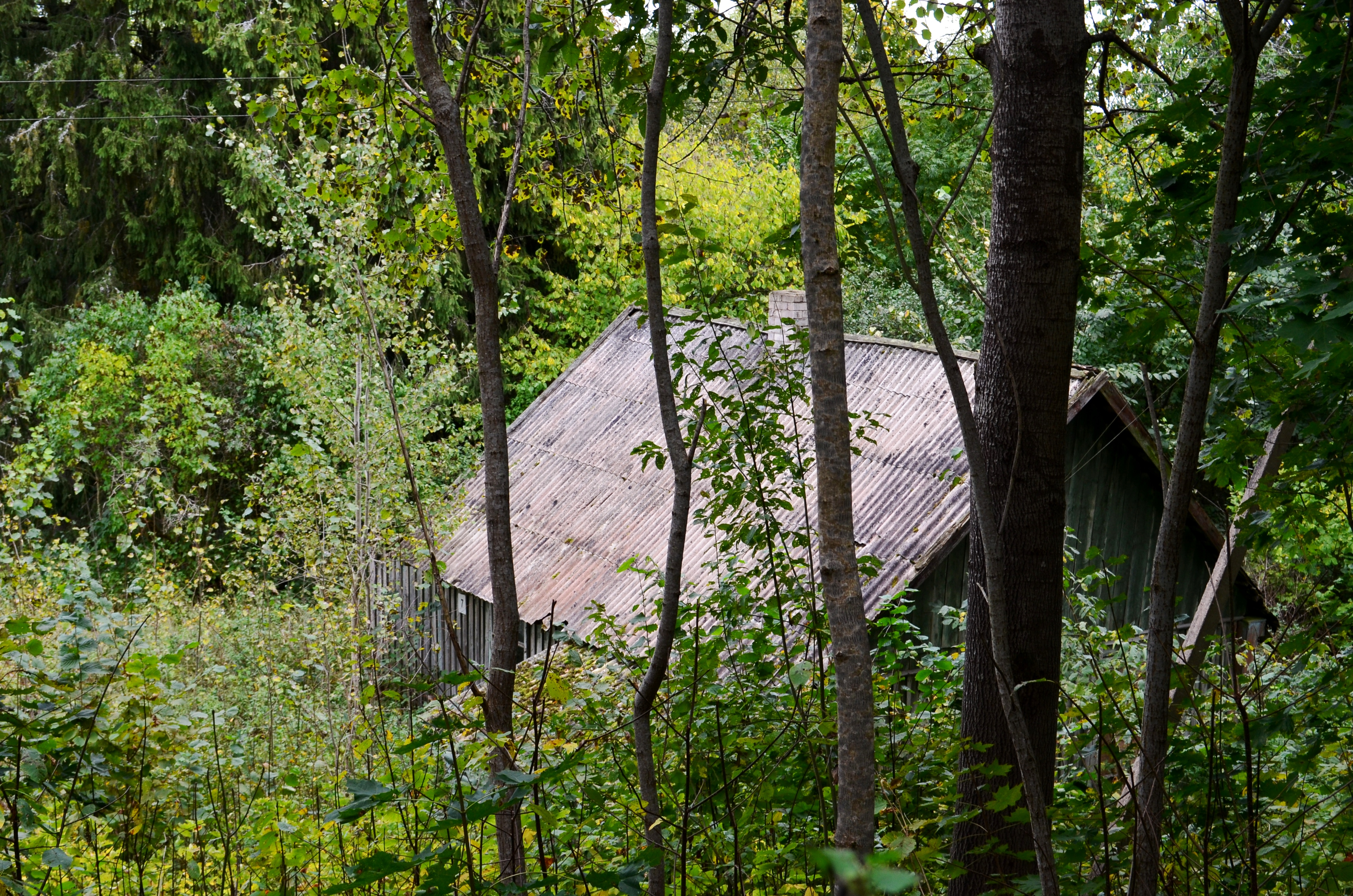 Pagirgždūtis, Telšių raj.